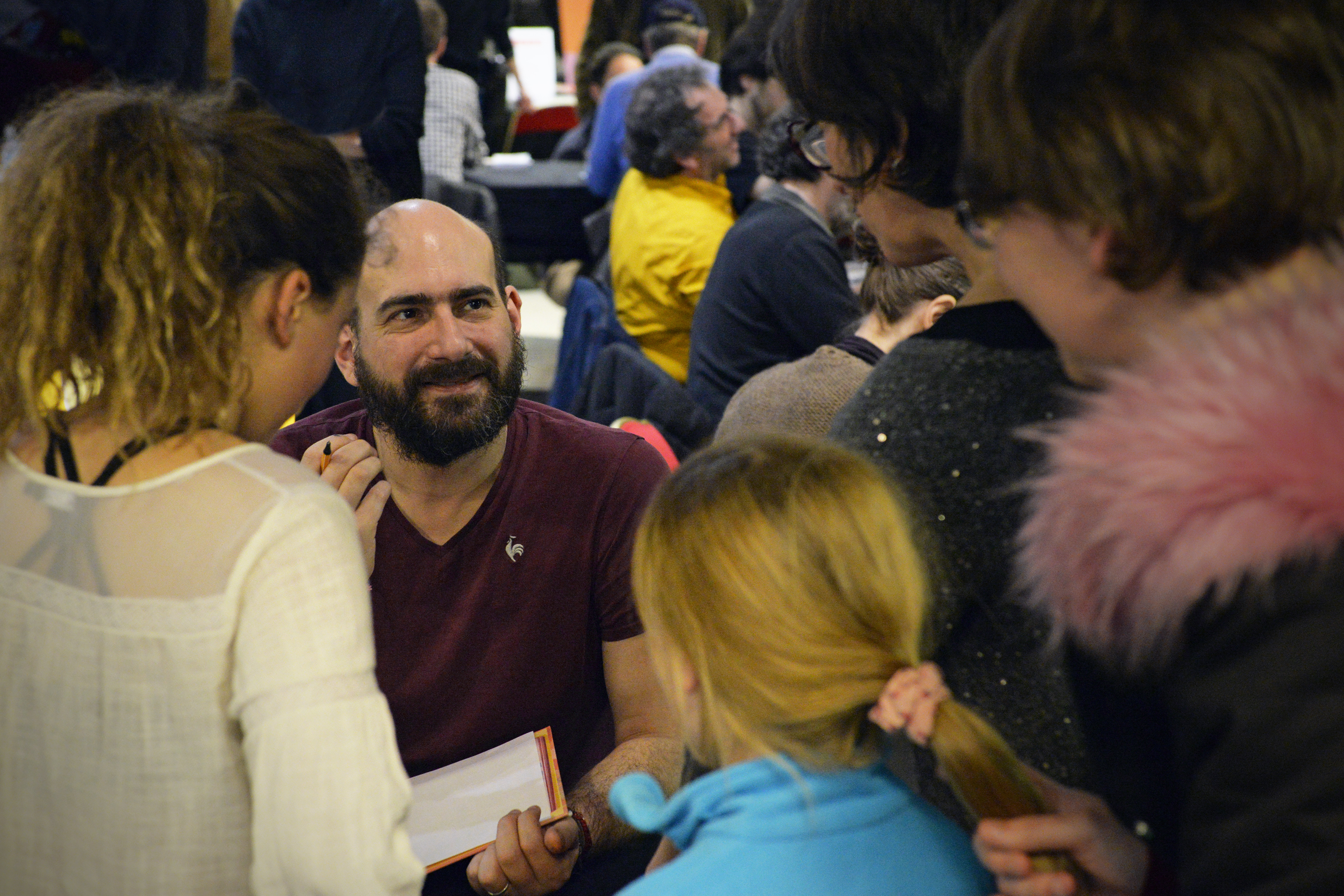 Julien Neel, Festival International de la Bande Dessinée d'Angoulême 2017.